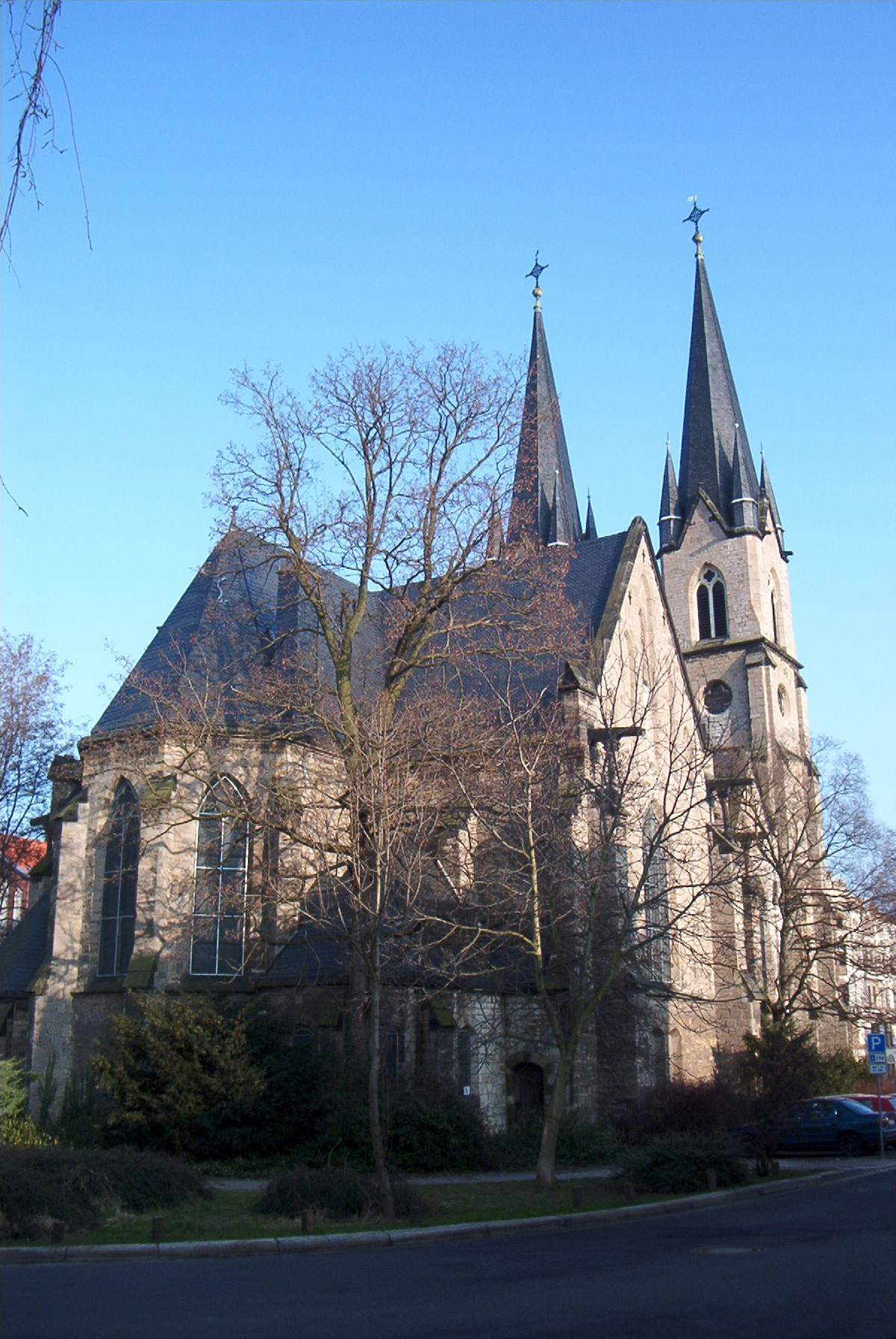 Ambrosiuskirche Magdeburg, Rückseite, Aufnahme am 24.3.2005 selbst erstellt, erteilte Lizenz: GNU-FDL